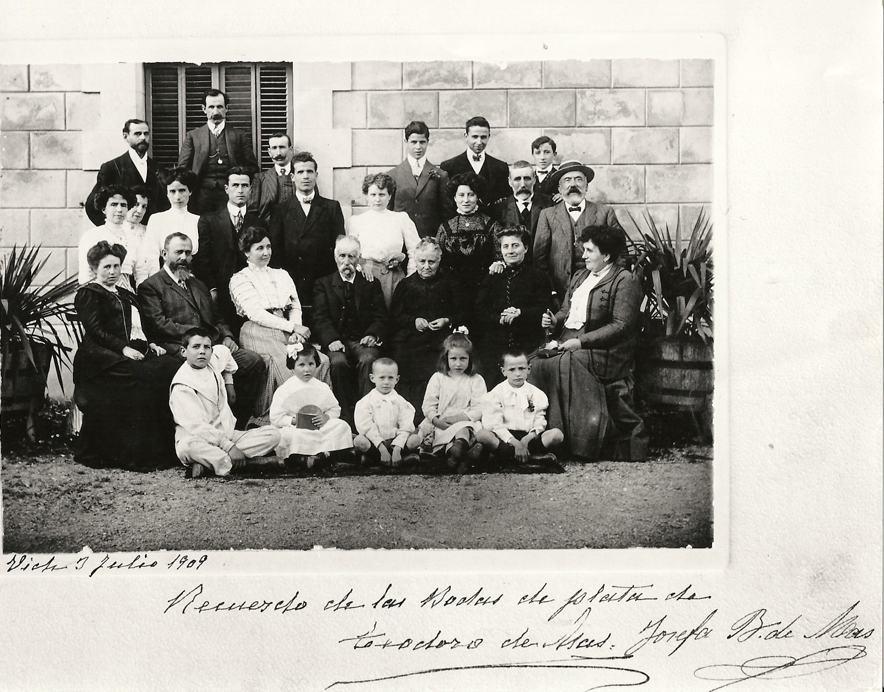 Recuerdo de las Bodas de Plata de Teodoro de Mas y Josefa B. de Mas